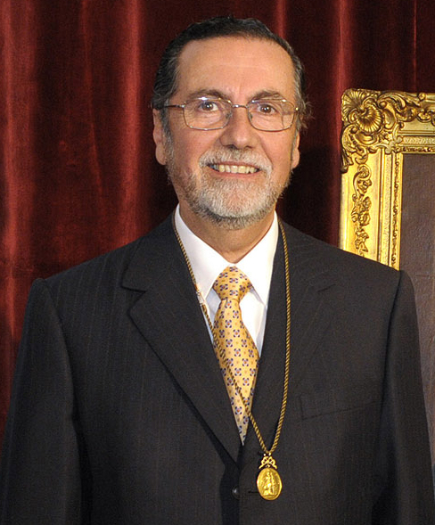 Victor Pérez Vera, rector de la Universidad de Chile en 2010.